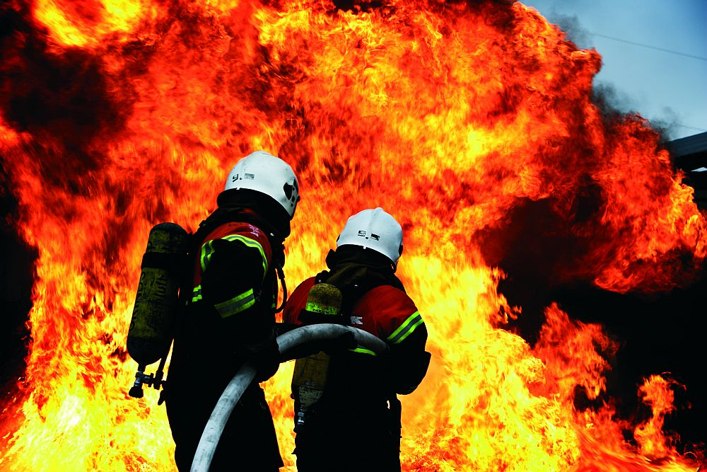 Brandmænd igang med ildslukning.